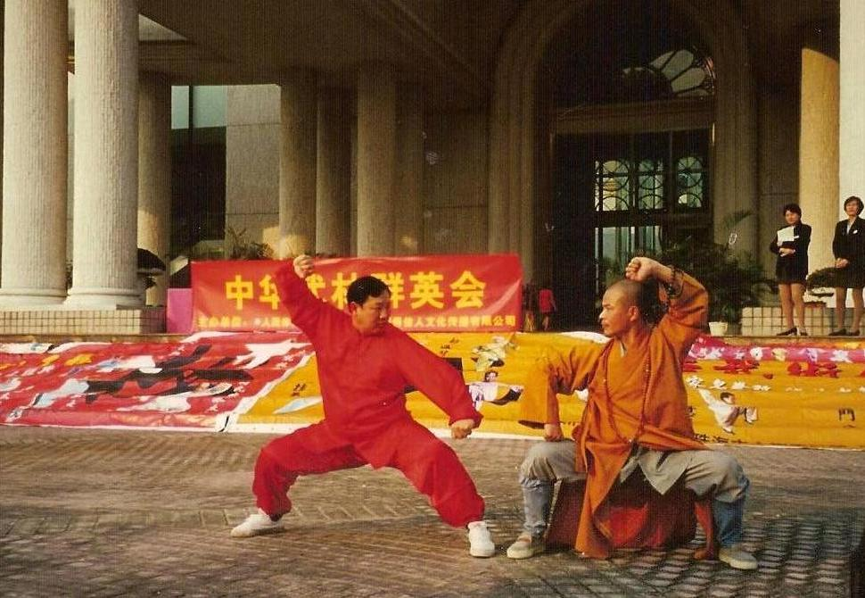 Expert International – autorisé par Chinese Wushu Association – en seine Comité National le Maître Wushu Traditionnel